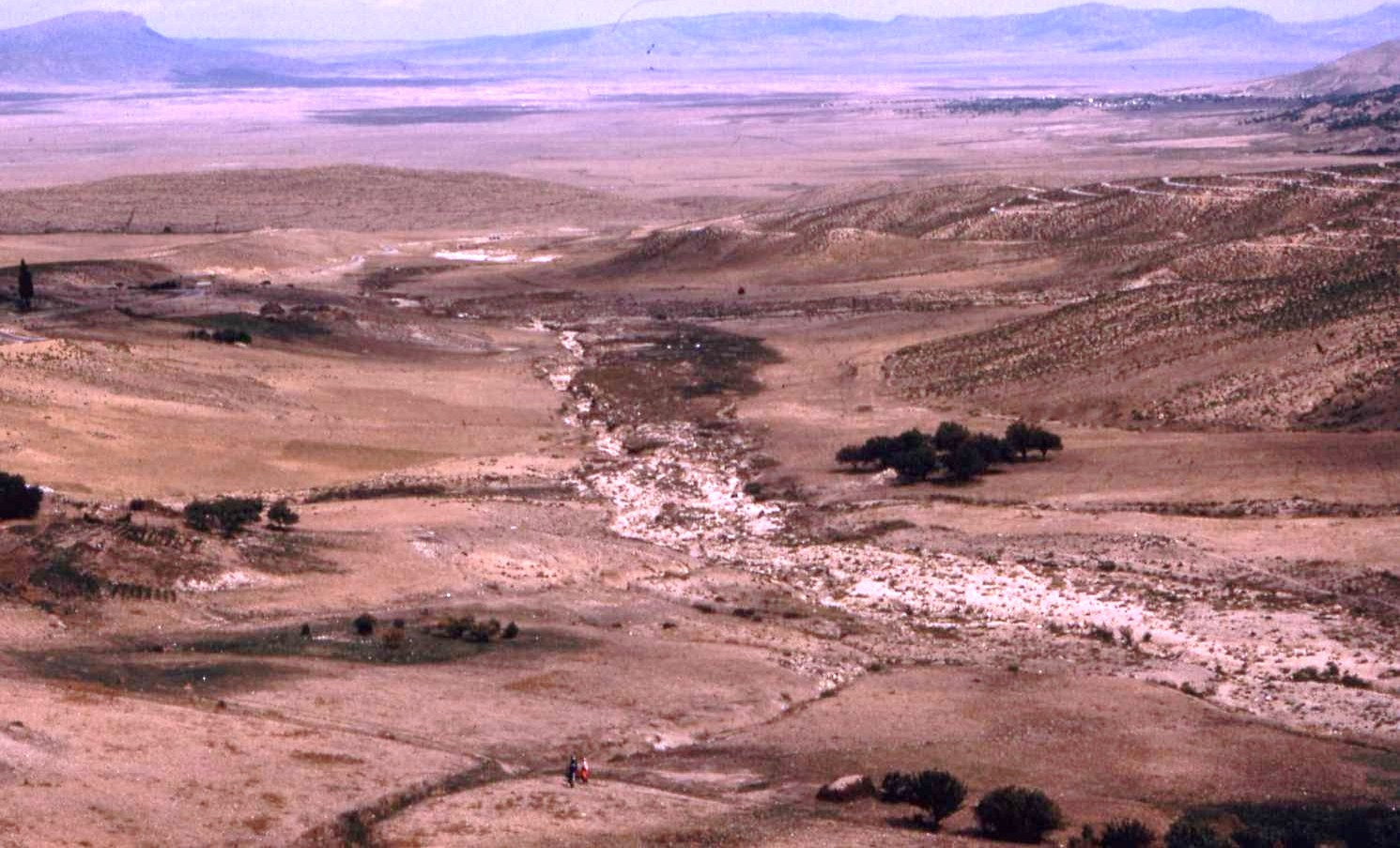 Paysage des Nememcha, Algérie.